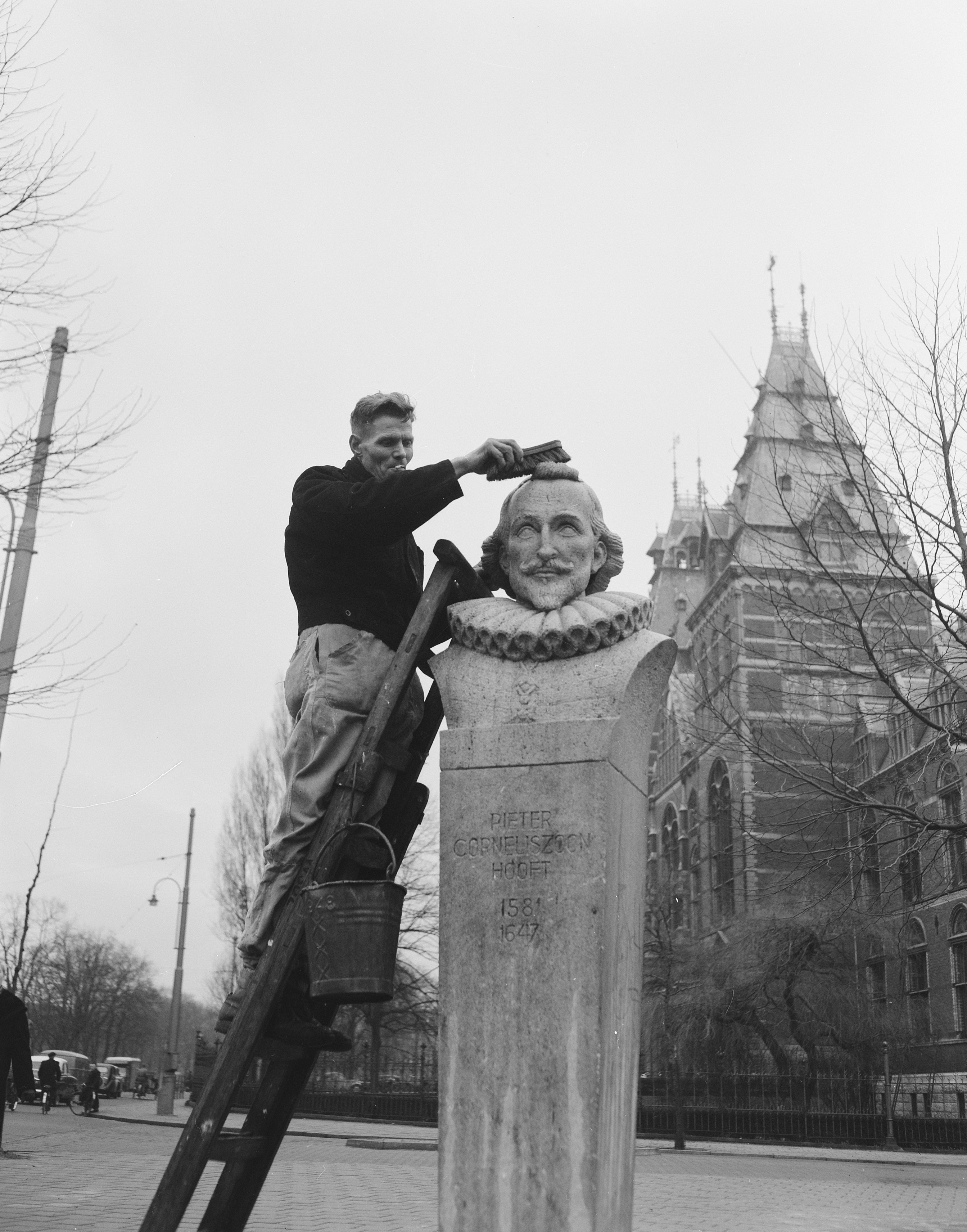 Collectie / Archief : Fotocollectie Anefo Reportage / Serie : [ onbekend ] Beschrijving : Voorjaar in Amsterdam beeld P. C. Hooft in schoonmaak Datum : 20 maart 1956 Locatie : Amsterdam, Noord-Holland Trefwoorden : SCHOONMAAK, beelden Persoonsnaam : Hooft, P.C. Fotograaf : Noske, J.D. / Anefo Auteursrechthebbende : Nationaal Archief Materiaalsoort : Negatief (zwart/wit) Nummer archiefinventaris : bekijk toegang 2.24.01.04 Bestanddeelnummer : 907-6504